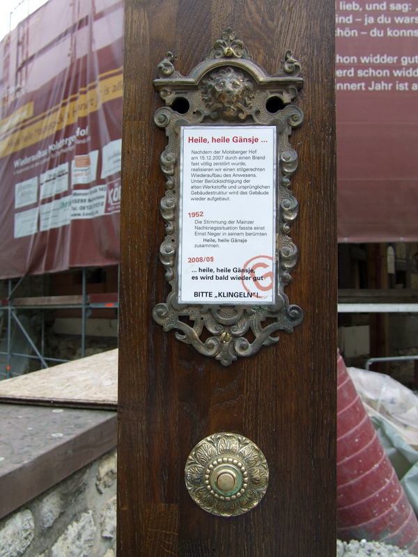 Klingel am Molsberger Hof in Bodenheim, nach dem Klingeln ertönt das Lied Heile, heile Gänsje